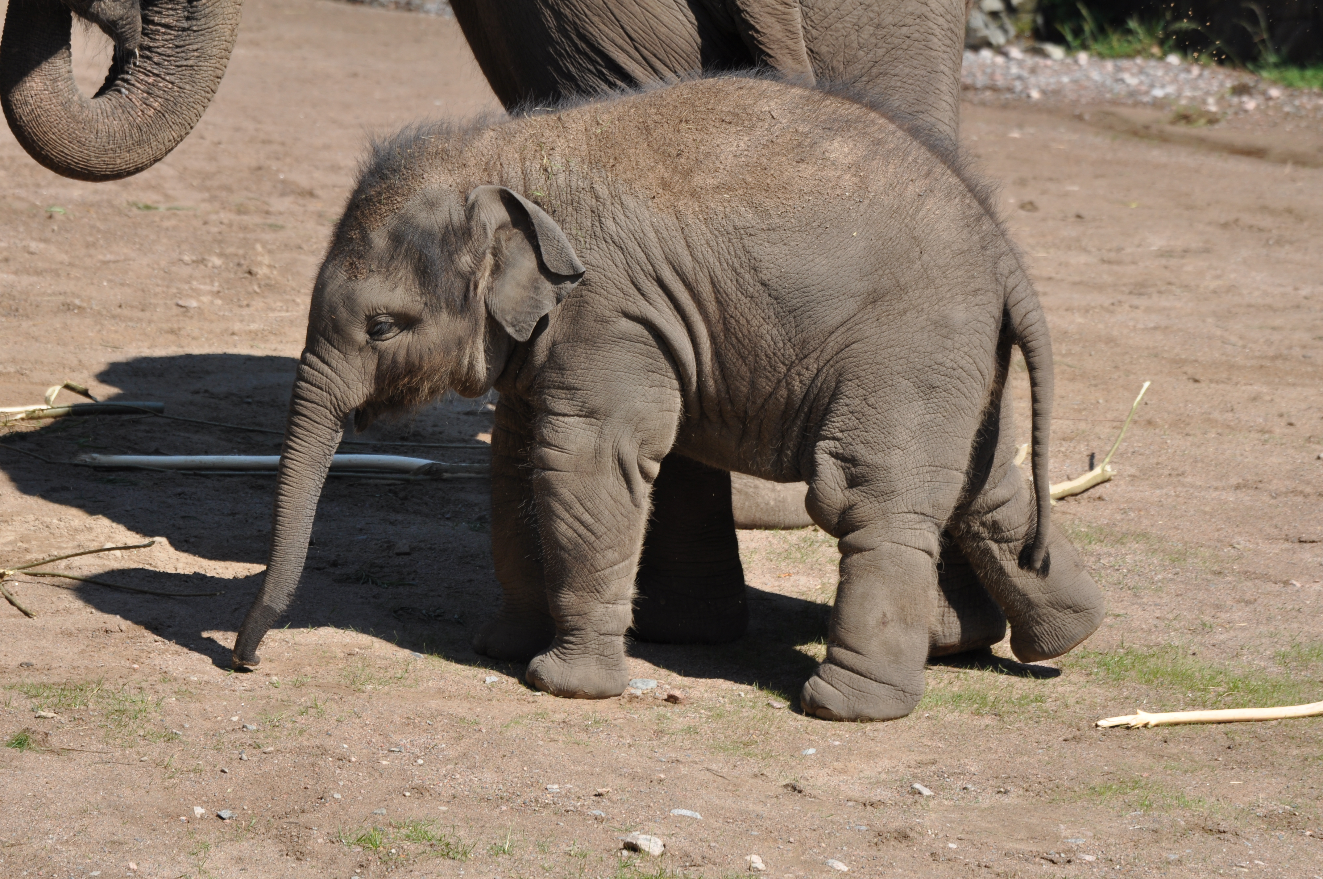 kolmårdens elefantkalv namsai kolmården djurpark